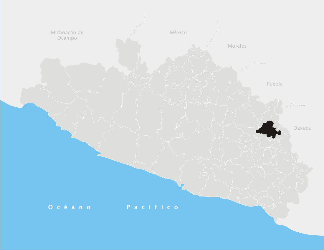 Tlapa de Comonfort en el estado de Guerrero (México)